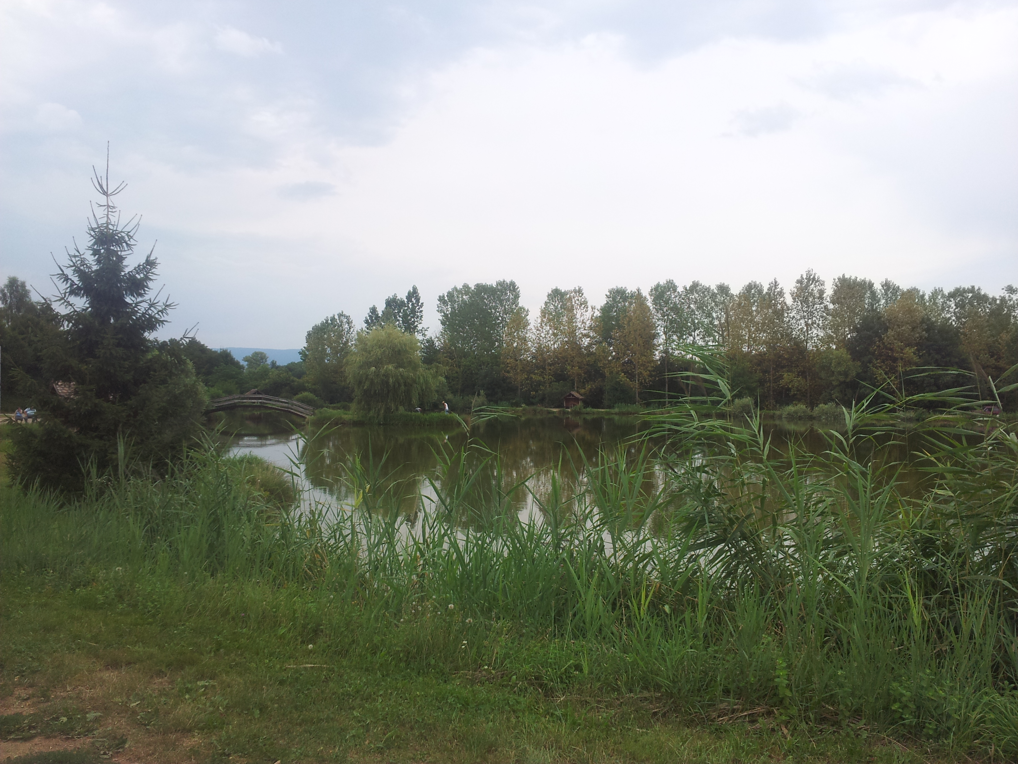 petit lac où l'on peut pêcher de la truite